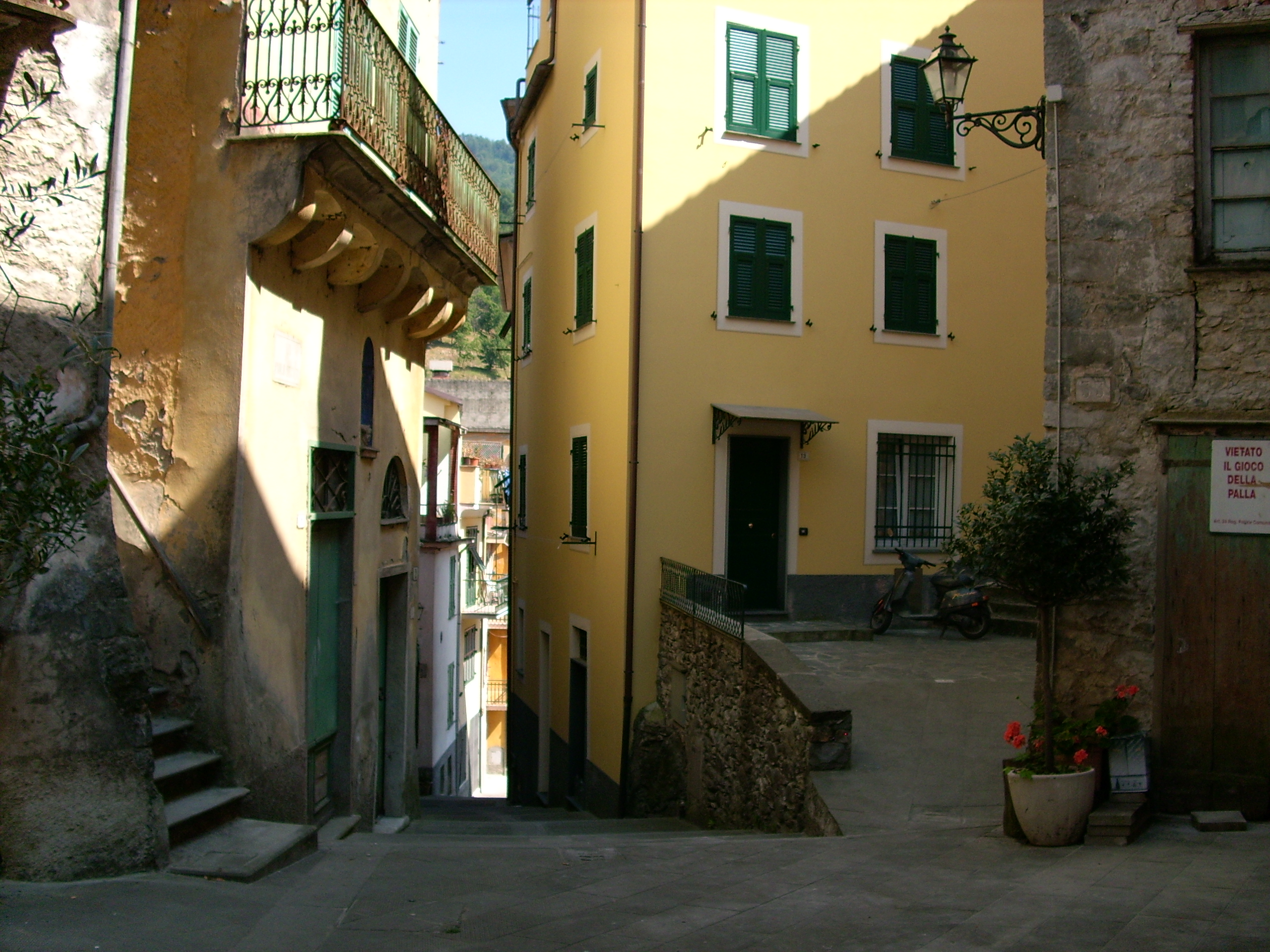 Borzonasca, Liguria, Italia